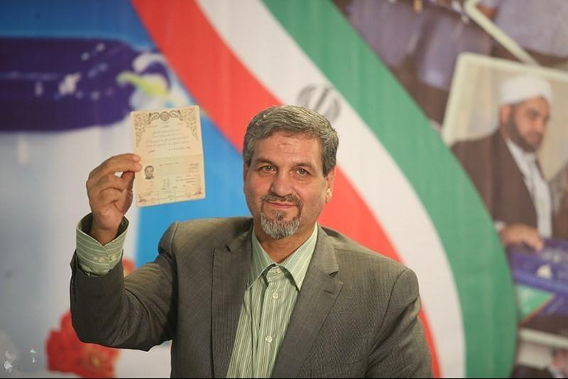 More Figures Applying for Candidacy for Post of President in Iran - TEHRAN (Tasnim) - Iranian President Hassan Rouhani was among figures who applied on Friday for candidacy for the May 19 presidential election in Iran.